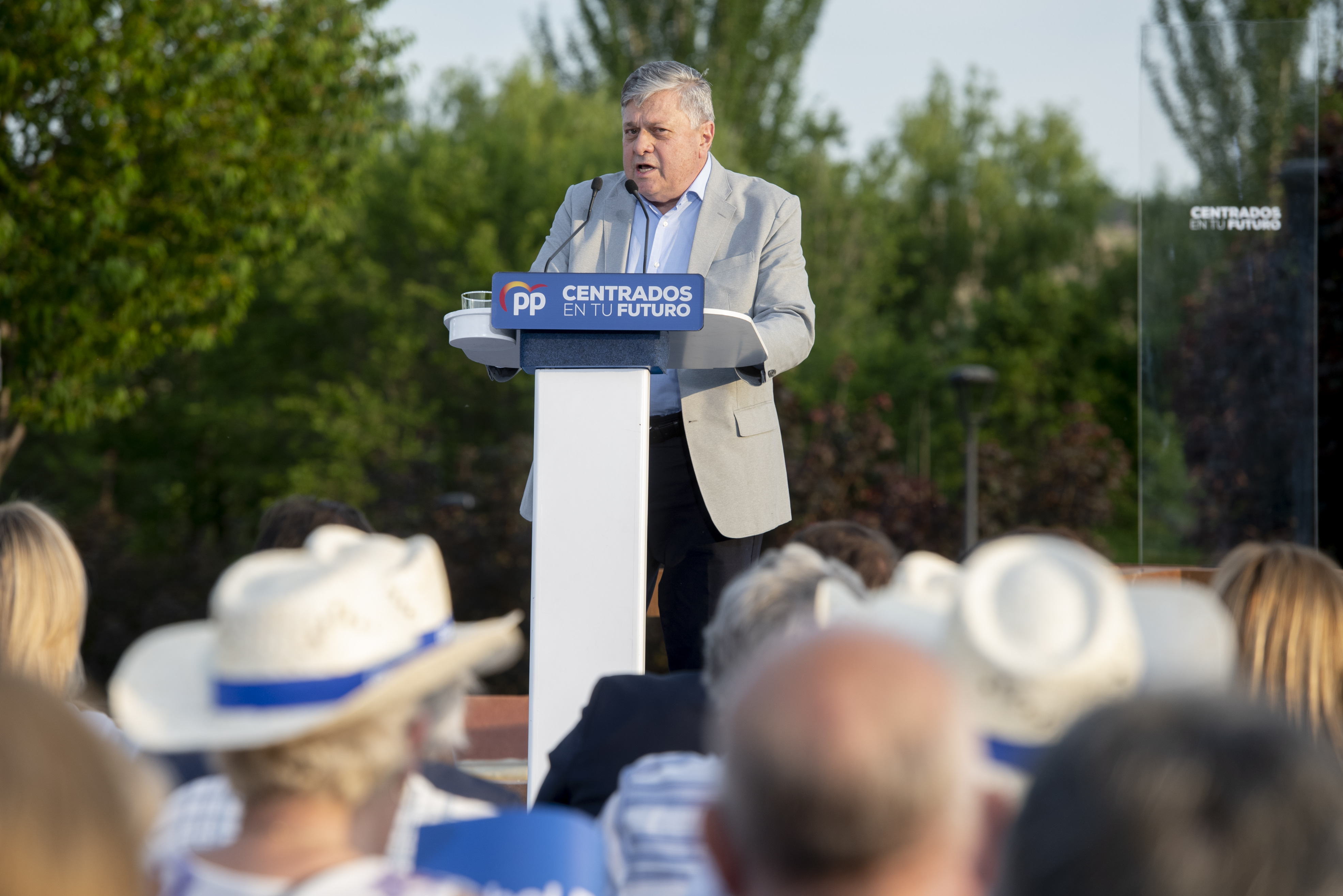 Leopoldo López Gil en un mitin de Ayuso y Pablo Casado en Torrejón.